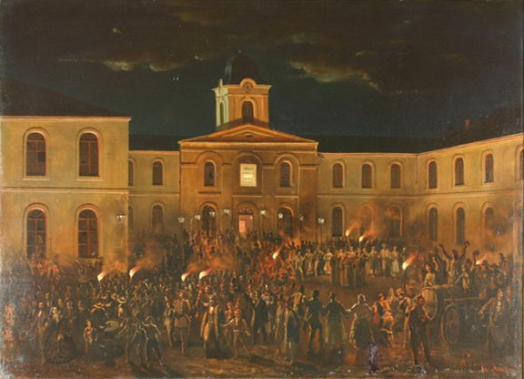 Theodor Aman - Hora Unirii la Craiova, ulei pe pânză, Muzeul Naţional de Artă al României, Bucureşti